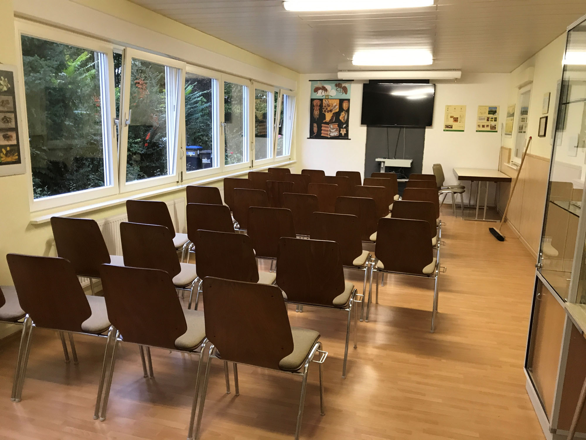 Schulungsraum Imkerschule Heidelberg